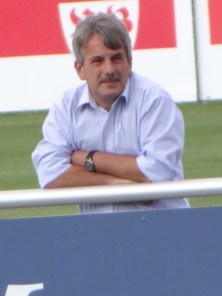 Aufgenommen beim VfB Training von